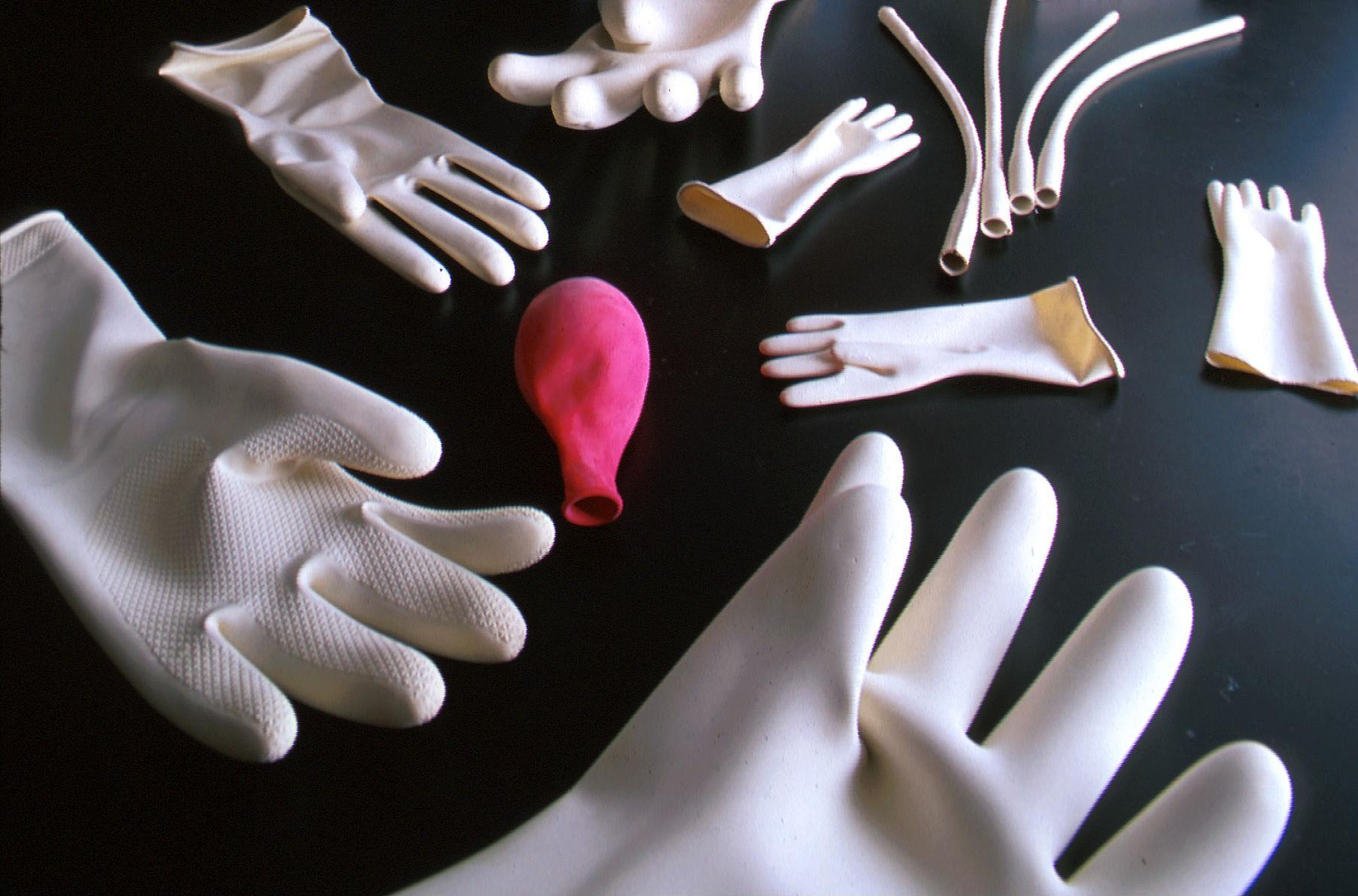 experimental, allergen-free latex products made from guayule